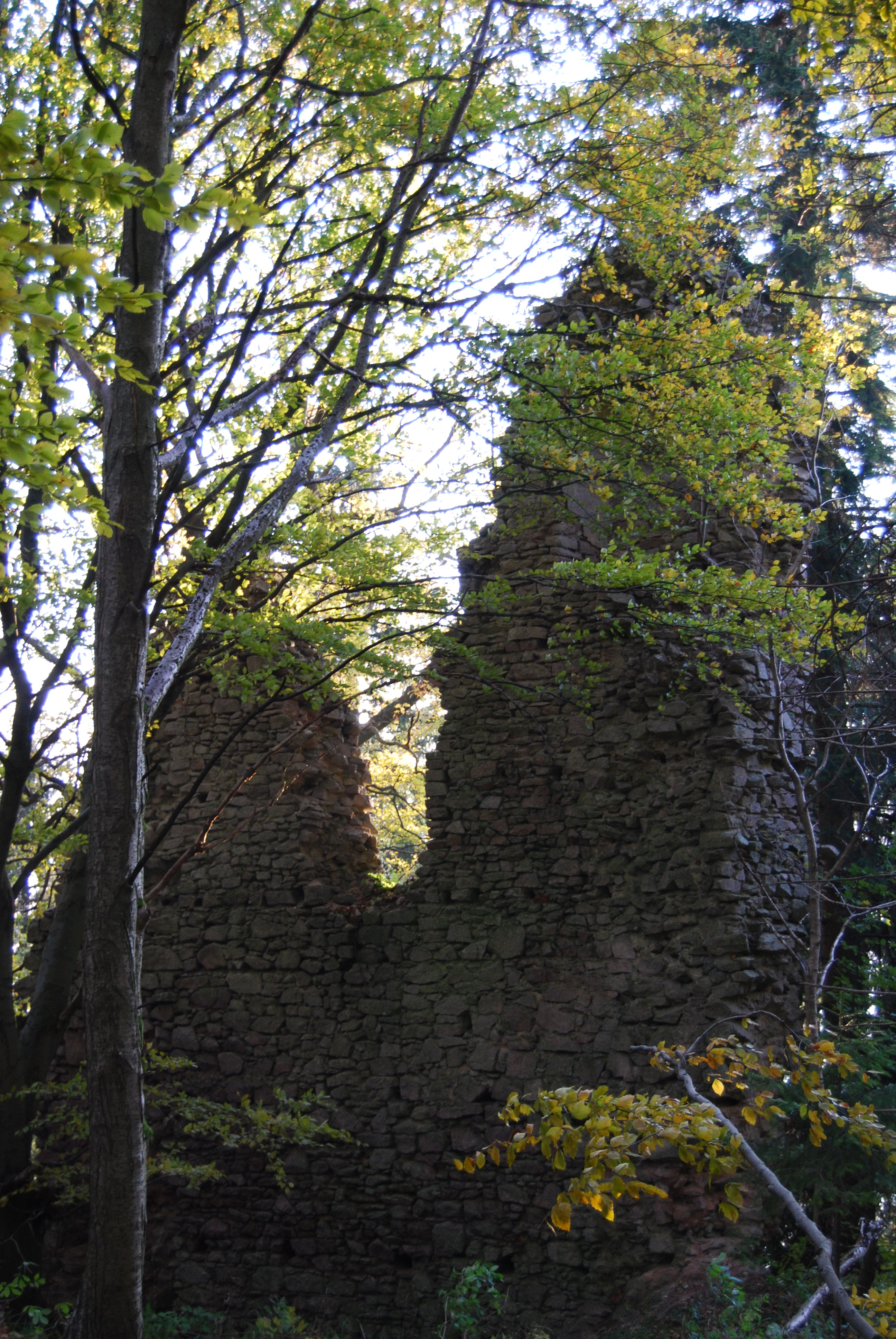 Kynžvart. Zřícenina hradu na pokraji Slavkovského lesa v okrese Cheb. Asi 1 km severně od obce Lázně Kynžvart. Čechy.